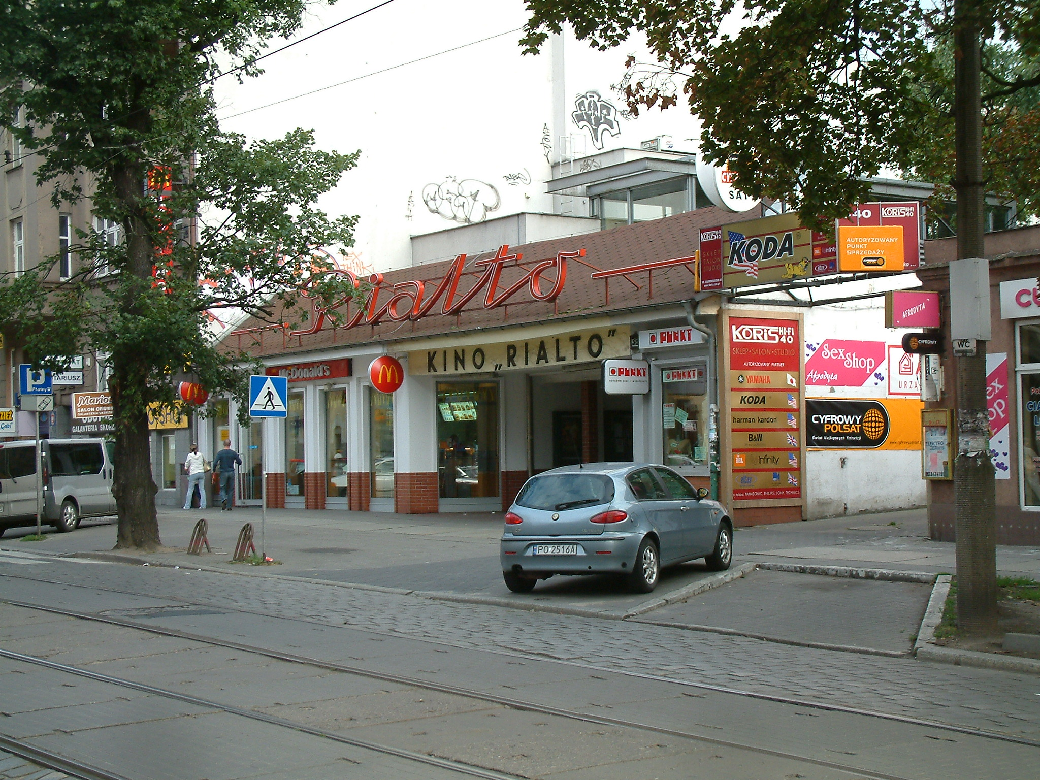 Rialto Cinema in Poznań